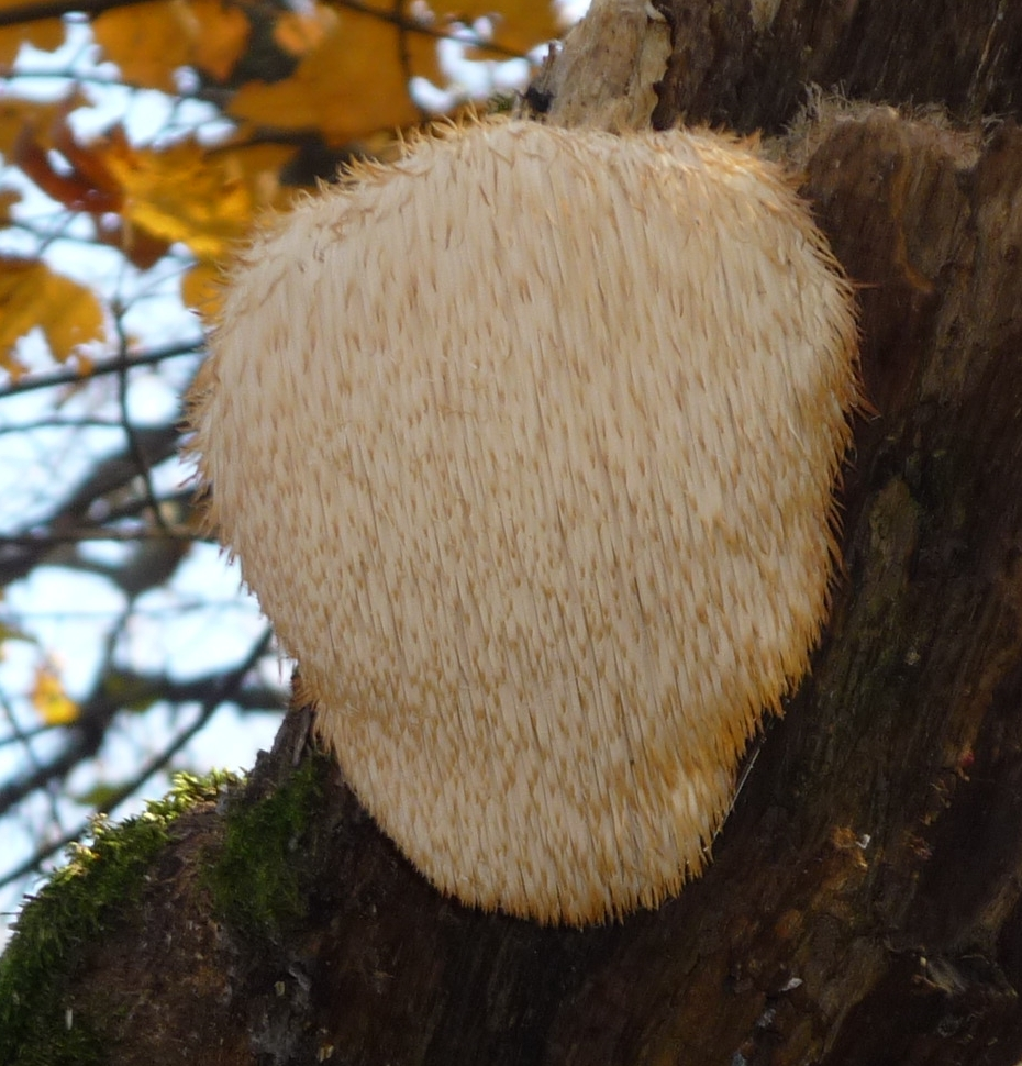 Ежевик гребенчатый (Hericium_erinaceus) найден в окрестностях г. Старый Крым